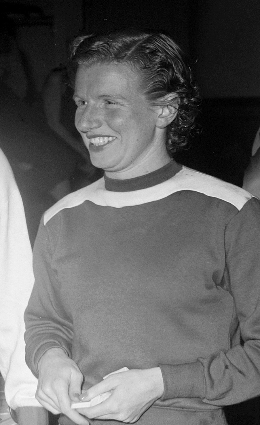 Zwemwedstrijd ADZ Irma Schuhmacher